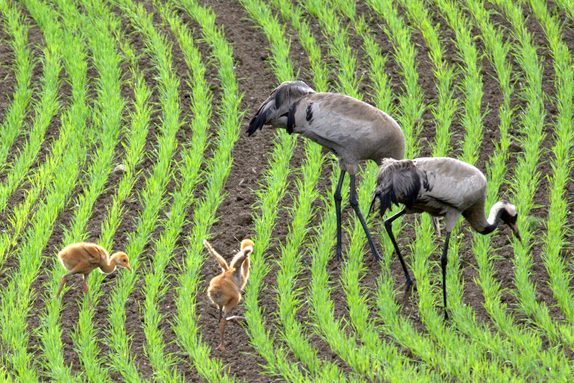 Kurkiperhe pellolla